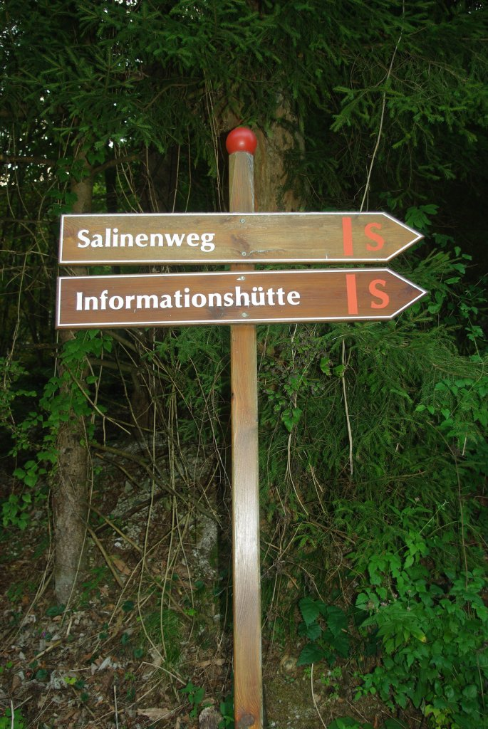 Wegweiser Salinenwege (Soleleitungsweg) in 83435 Bad Reichenhall